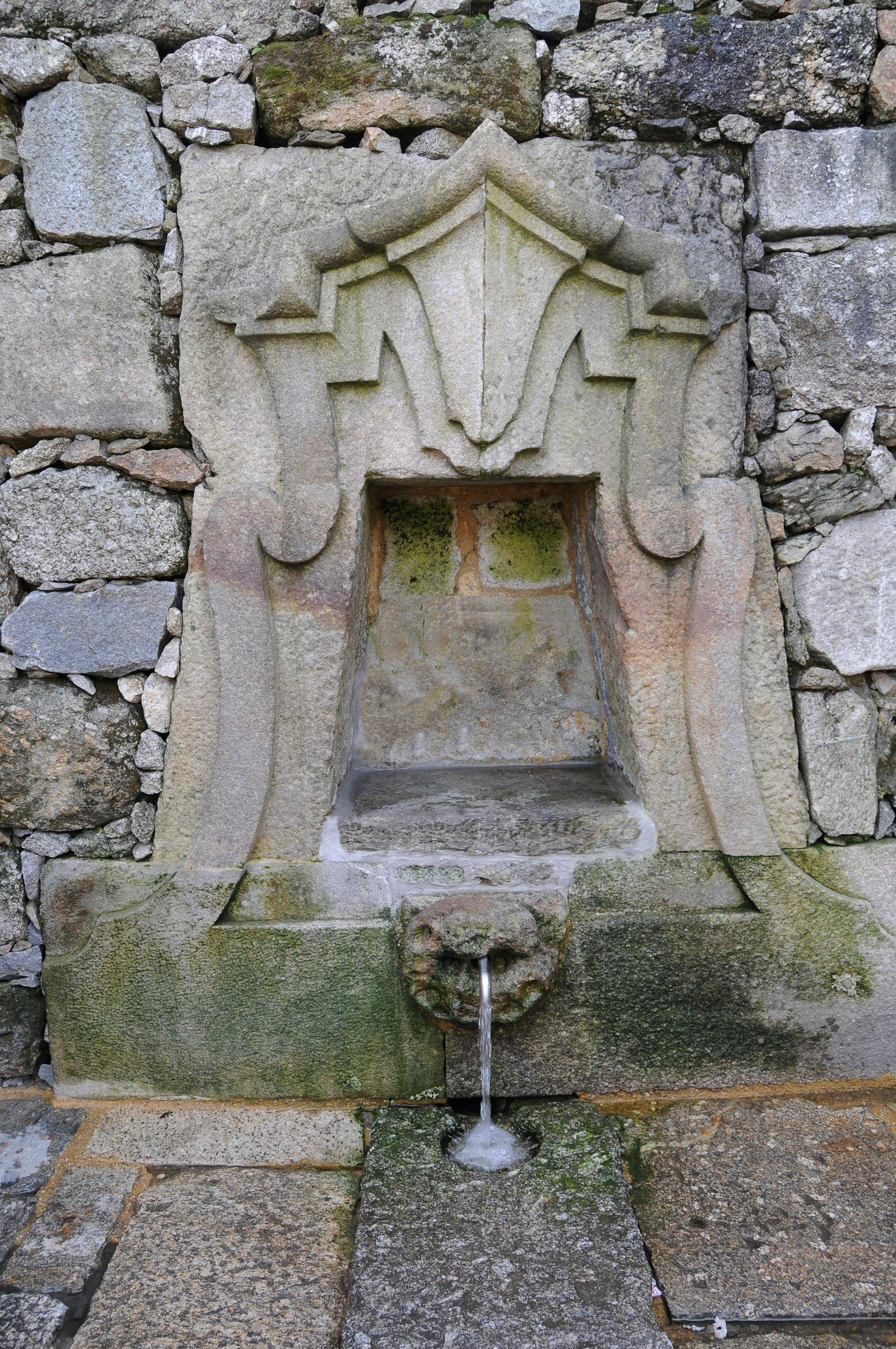 Aguas Ferreas Fountain in Braga, Portugal